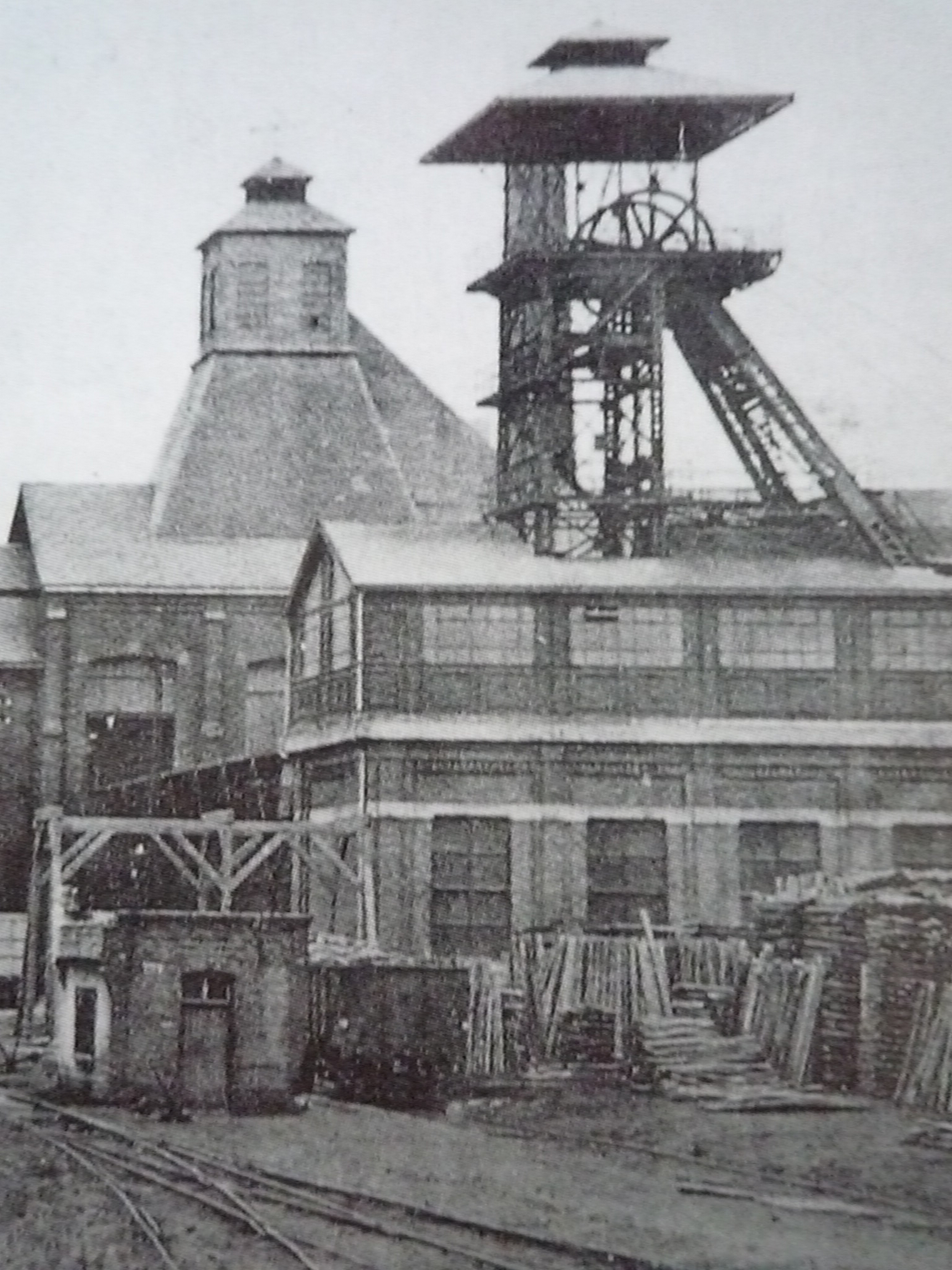 La Fosse n° 9 - 9 bis de la Compagnie des mines de Nœux était un charbonnage constitué de deux puits situé à Hersin-Coupigny, Pas-de-Calais, Nord-Pas-de-Calais, France.